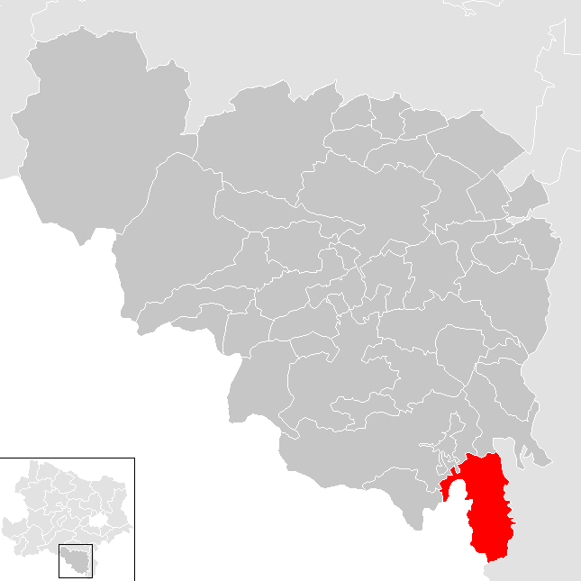 Bezirk Neunkirchen